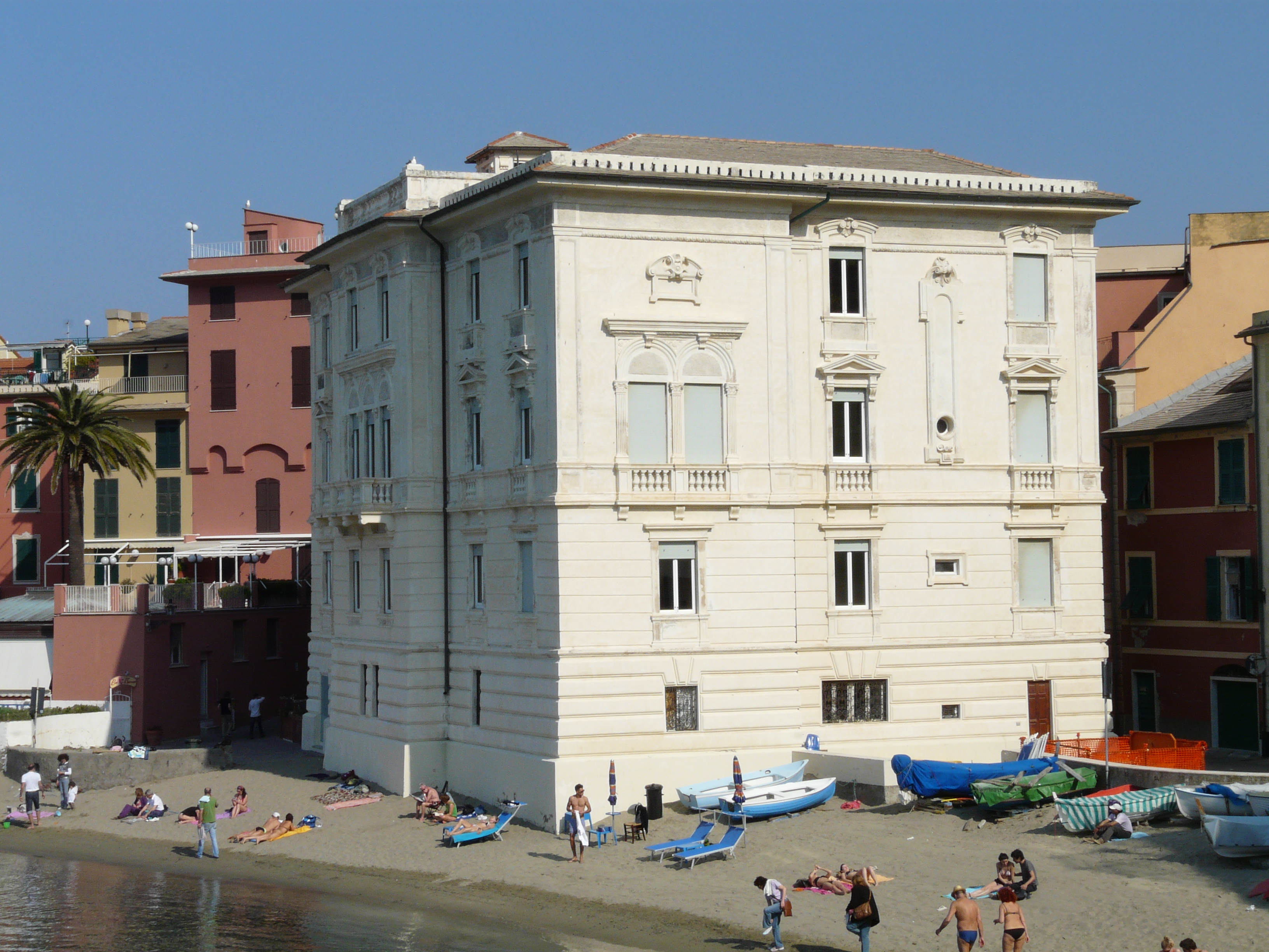 Palazzo della Galleria Rizzi, Sestri Levante, Liguria, Italia